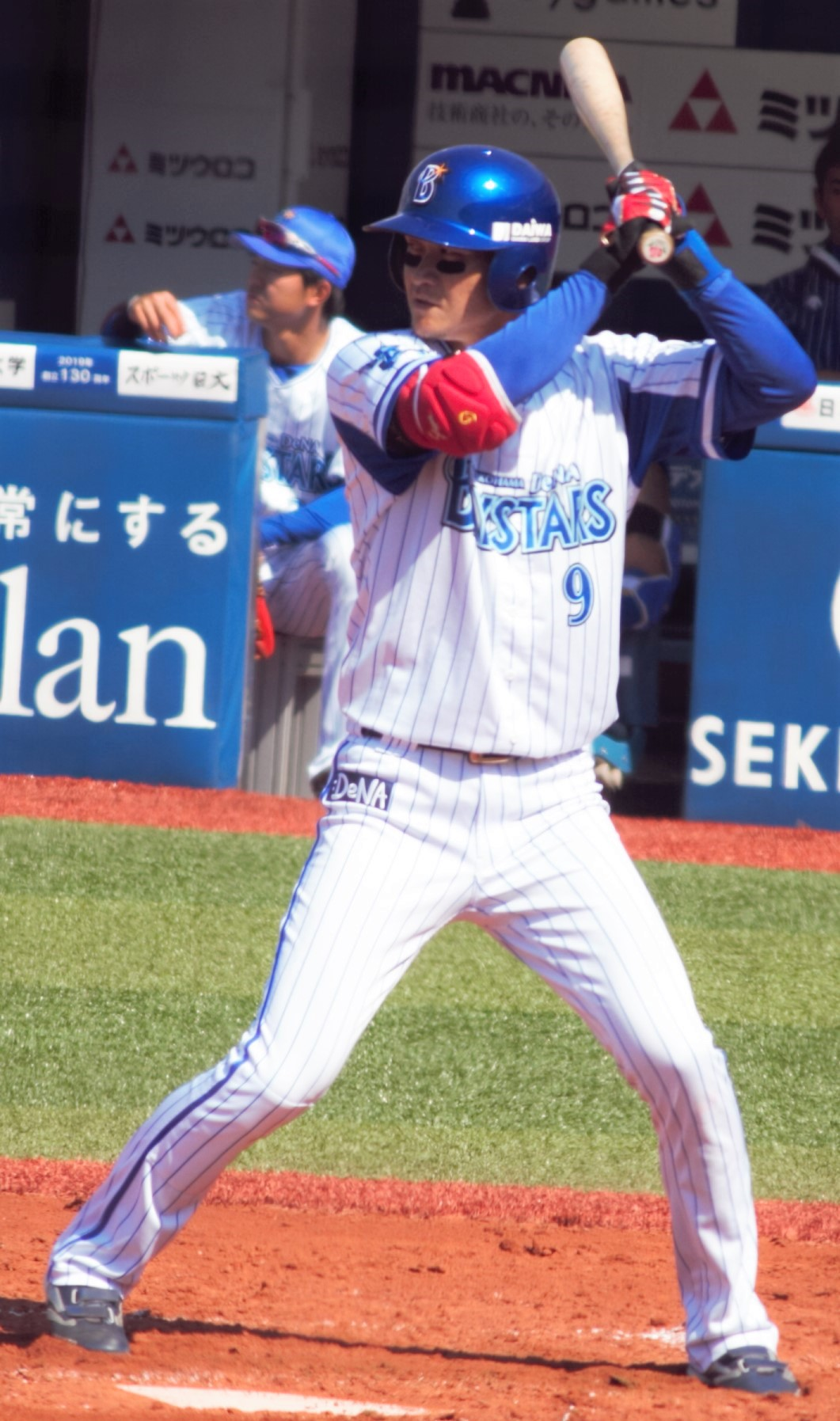 横浜DeNAベイスターズ内野手の前田大和。横浜スタジアムにて